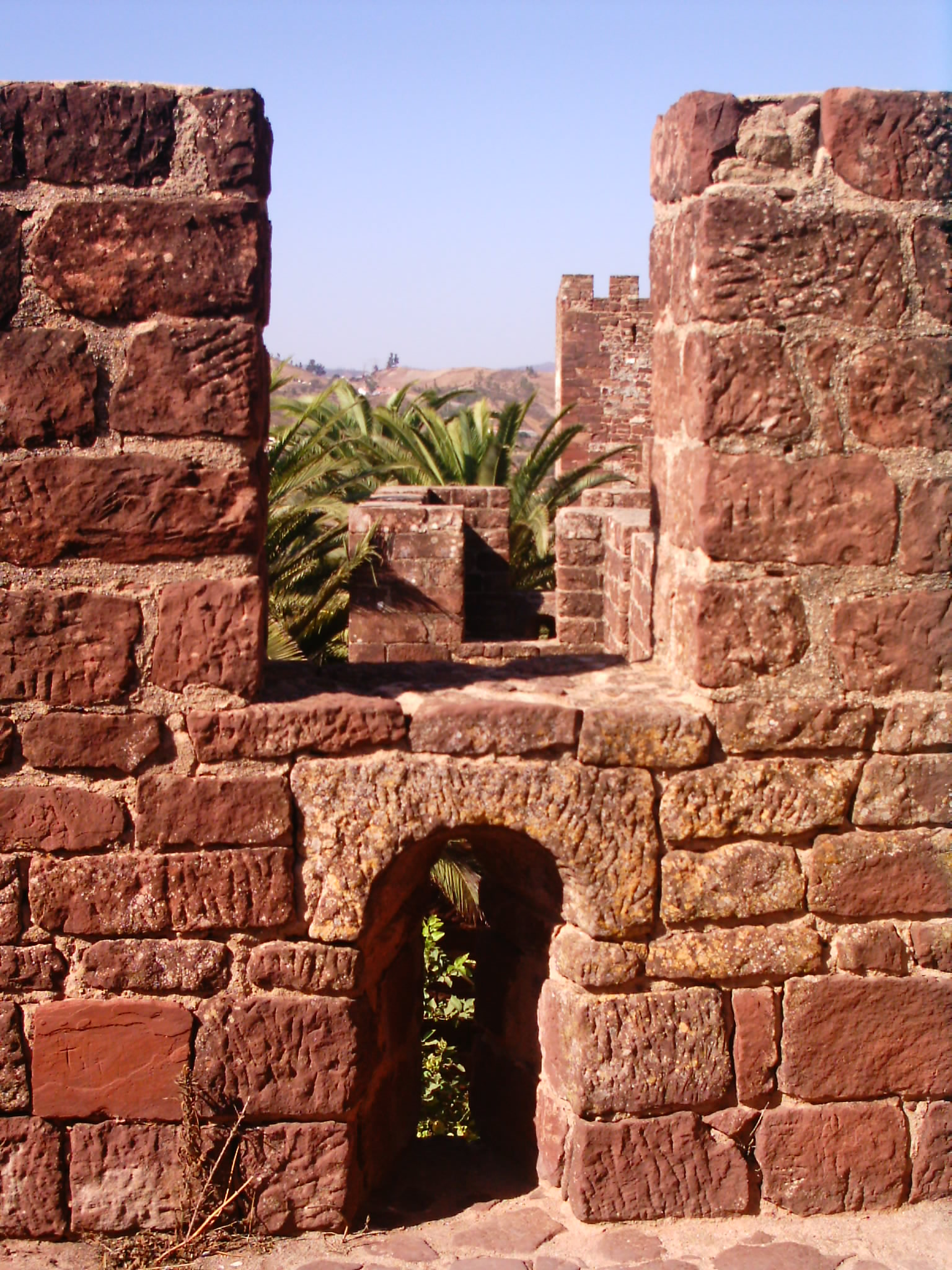 Castelo de Silves, Silves, Portugal.